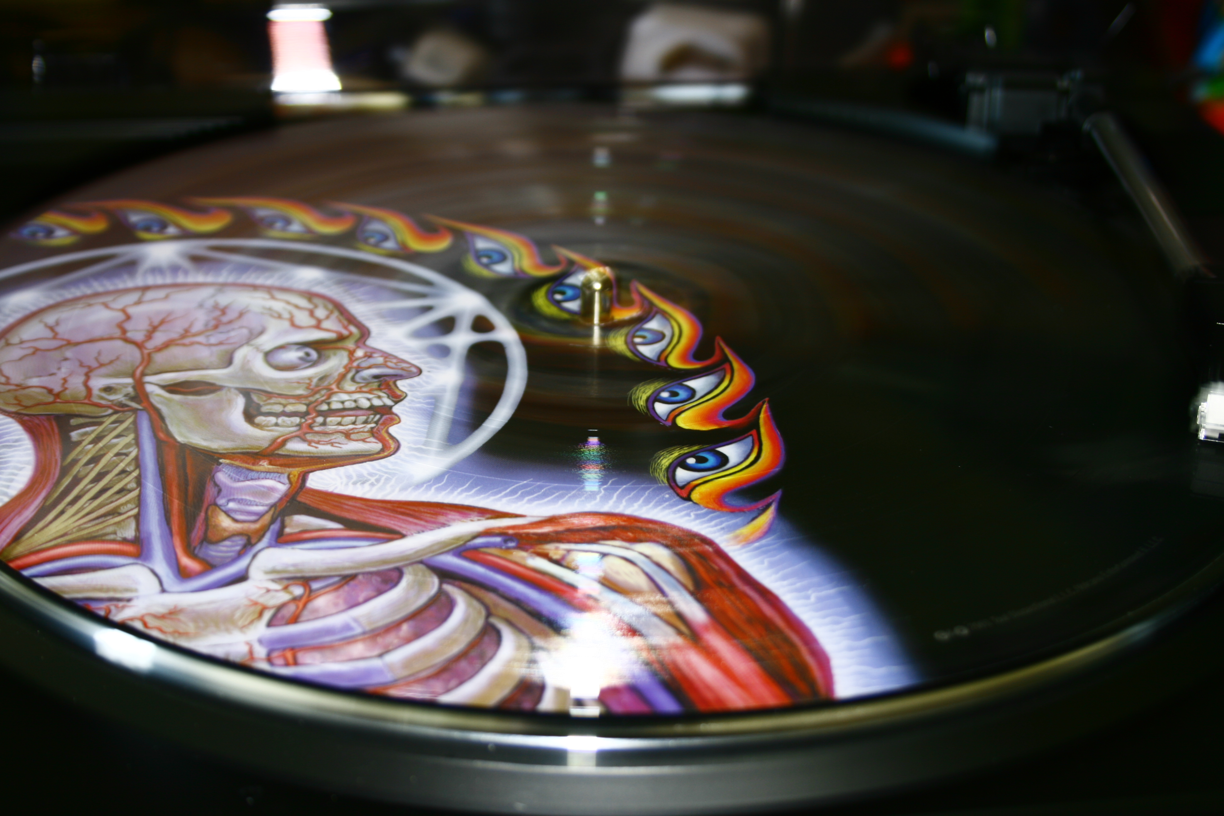 disco de vinilo de tool